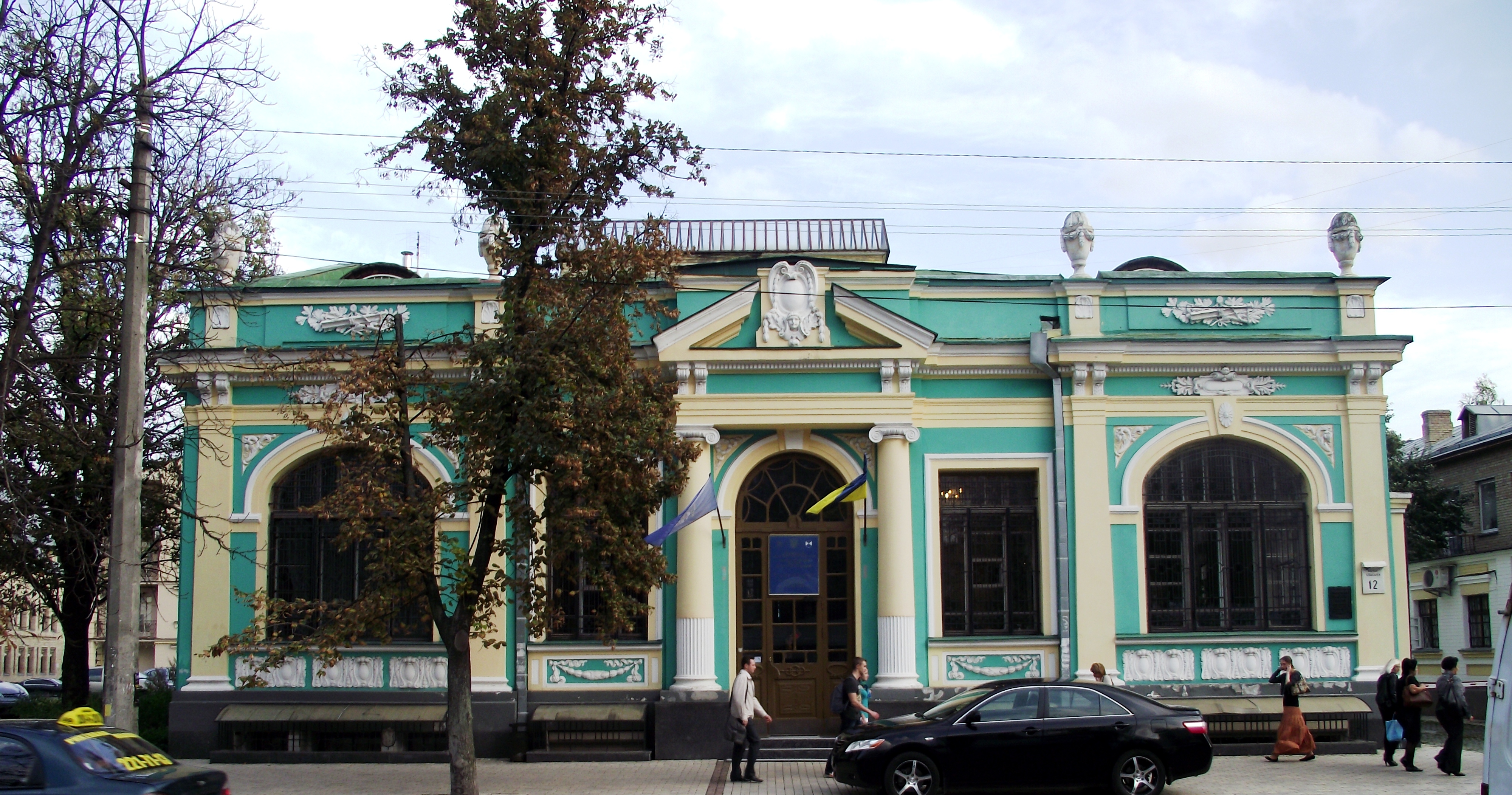 Тут містився штаб загону червоних козаків під командуванням В. М. Примакова. Також тут зроблено фотографію "Райком закритий. Всі пішли на фронт". Зараз будинок займає Головне управліня охорони культурної спадщини. арх. В.Риков 1912